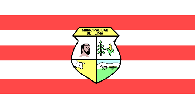 Bandera del distrito de Lima, Paraguay.